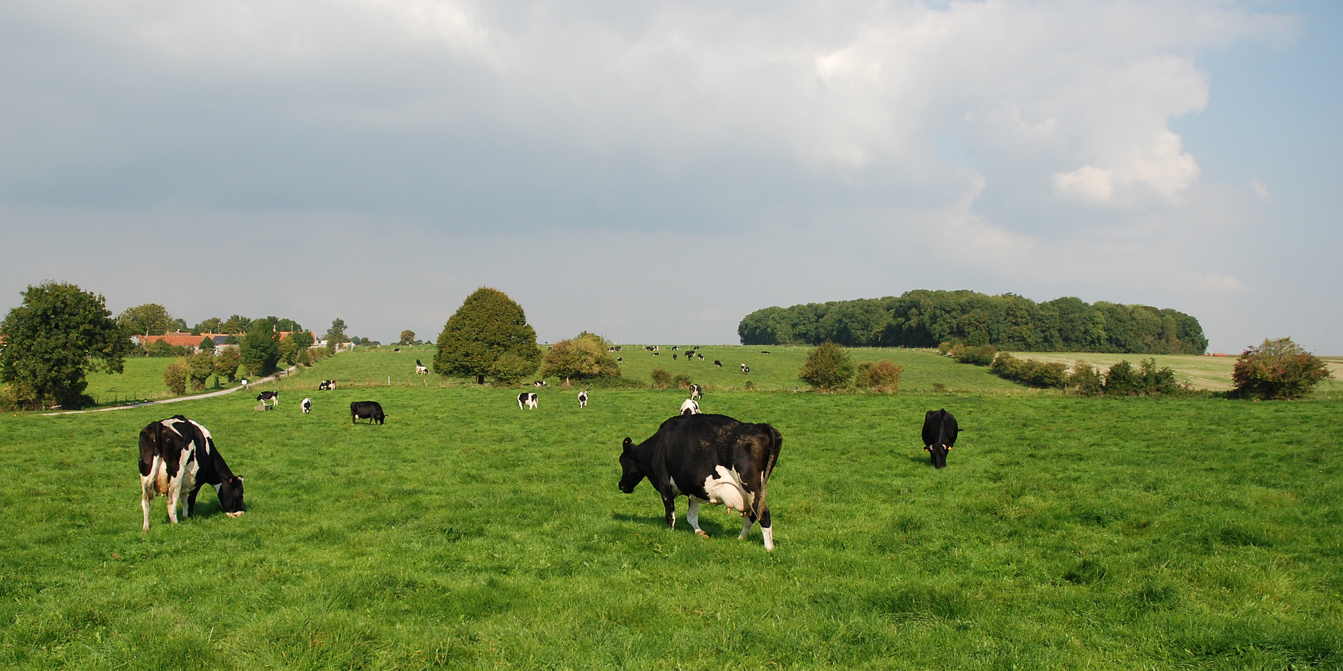 Noyelles sur Mer, Frankrijk